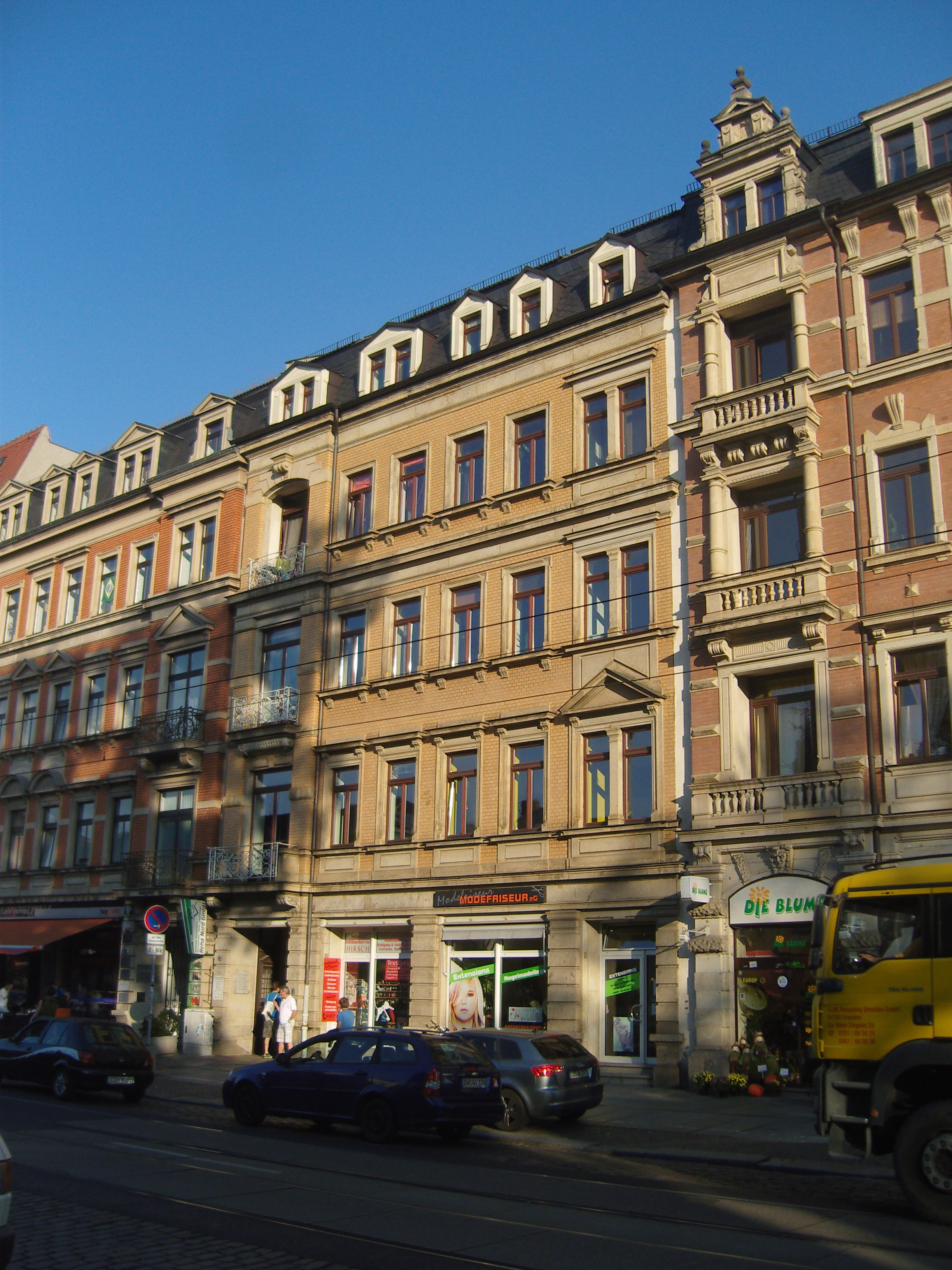 Denkmalgeschütztes Mietshaus mit Laden (Geburtshaus Schriftsteller Erich Kästner) in der Königsbrücker Straße 66 in Dresden